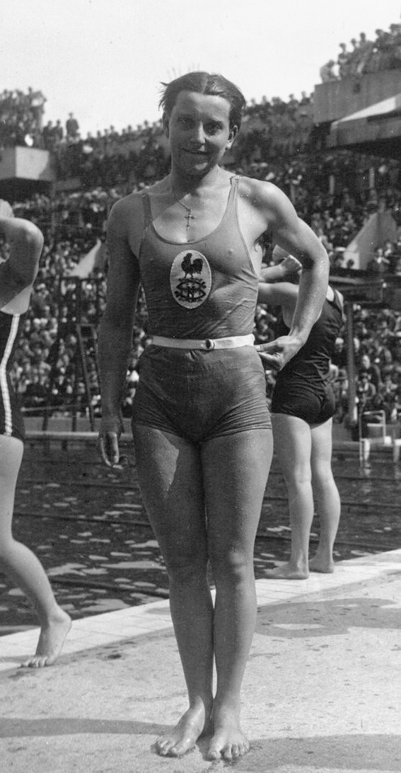 Les Tourelles : Championnats d'Europe : Melle Godard (portrait à 3 m) : [photographie de presse] / Agence Meurisse